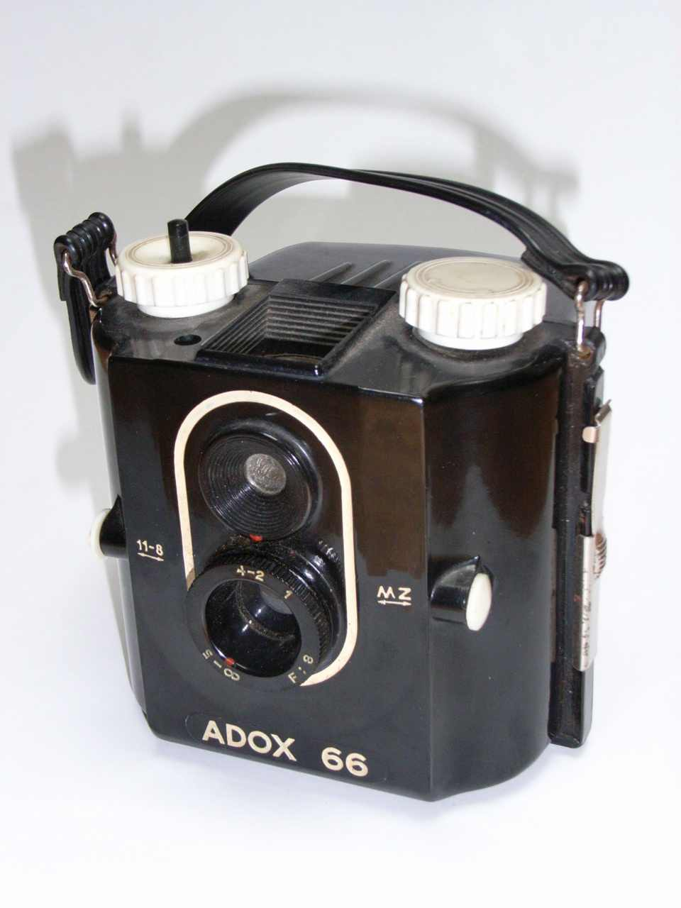 Adox 66, Rollfilm Box, Baujahr etwa 1950